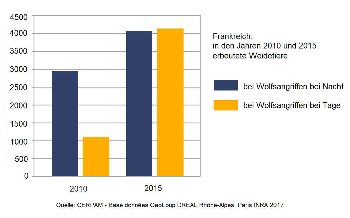 Veränderung bei den Zeiten von Wolfsangriffen auf Weidetiere mit zunehmender Gewöhnung der Wölfe an die Nähe des Menschen